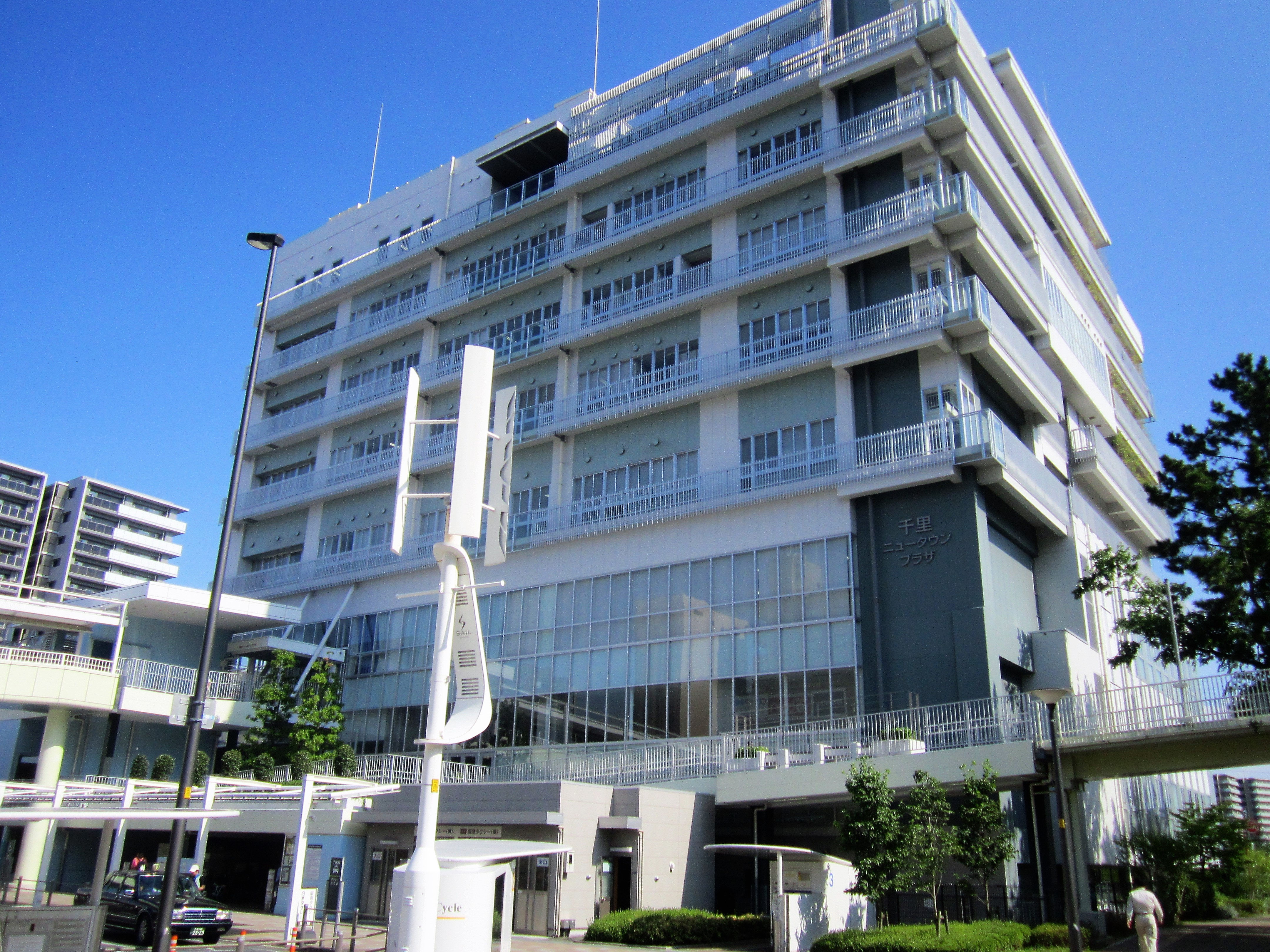 千里ニュータウンプラザ（吹田市津雲台、千里図書館などがある）